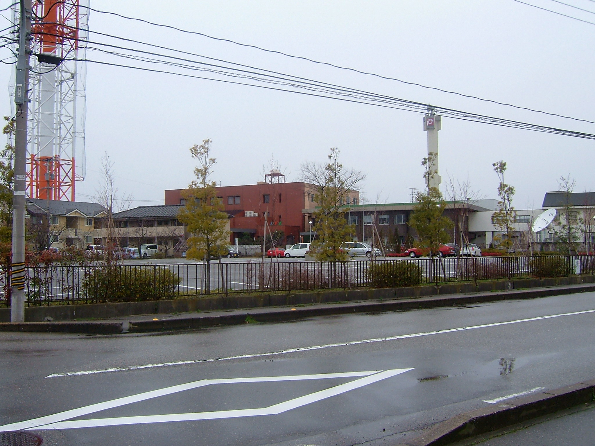 石川県金沢市観音堂町にあるja:石川テレビ放送本社。